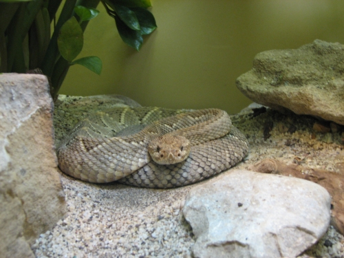 Aruba Rattle Snake